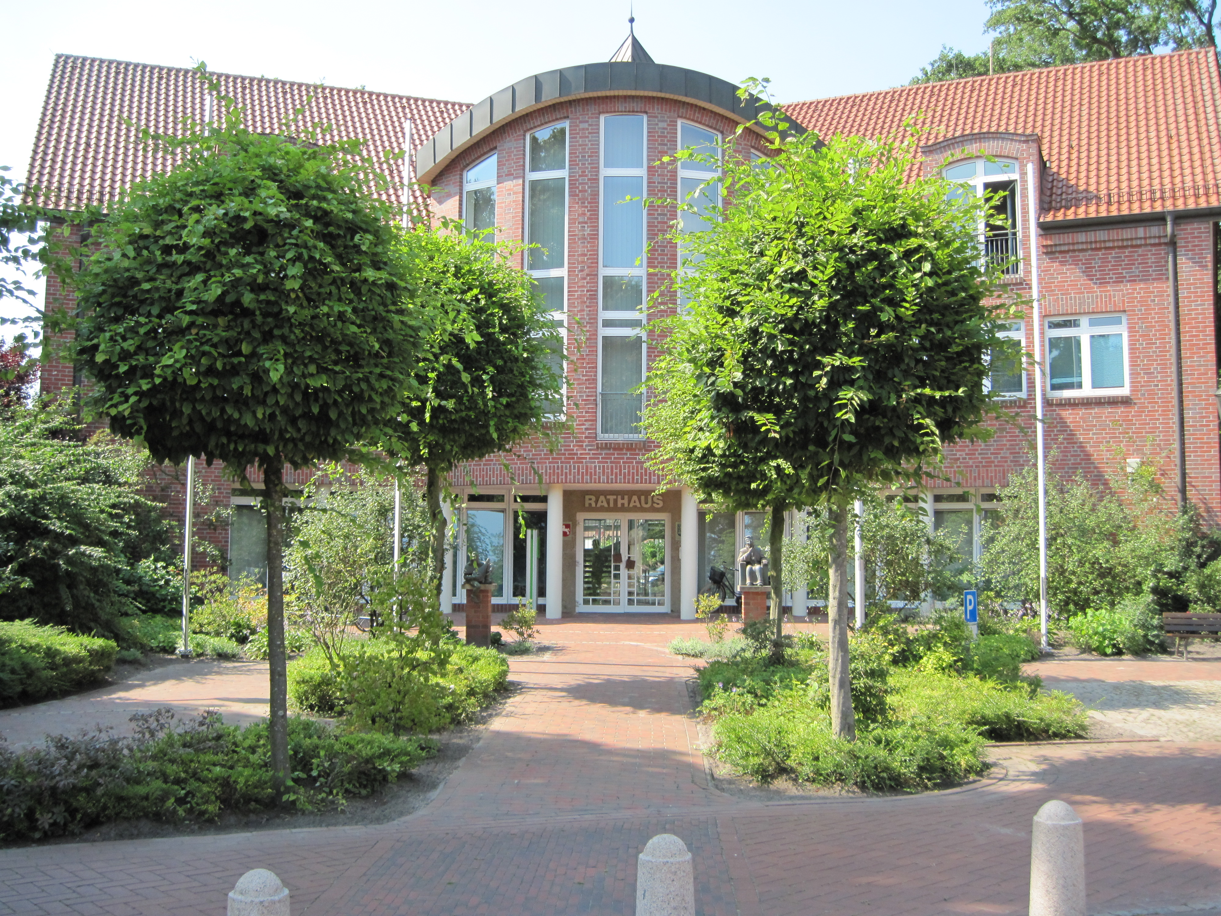 Rathaus der Gemeinde Lindern (Oldenburg)